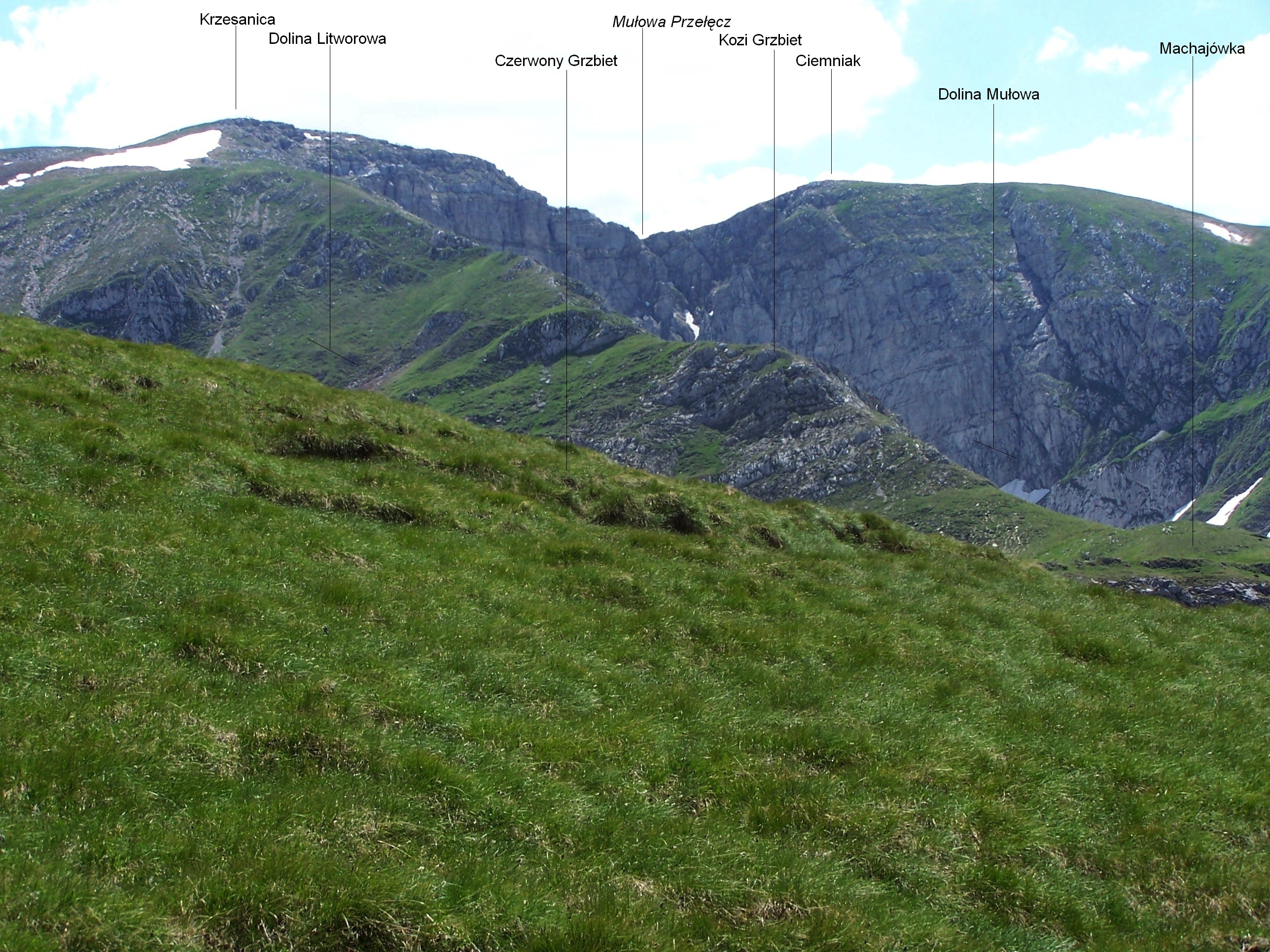 Widok z Czerwonego Grzbietu